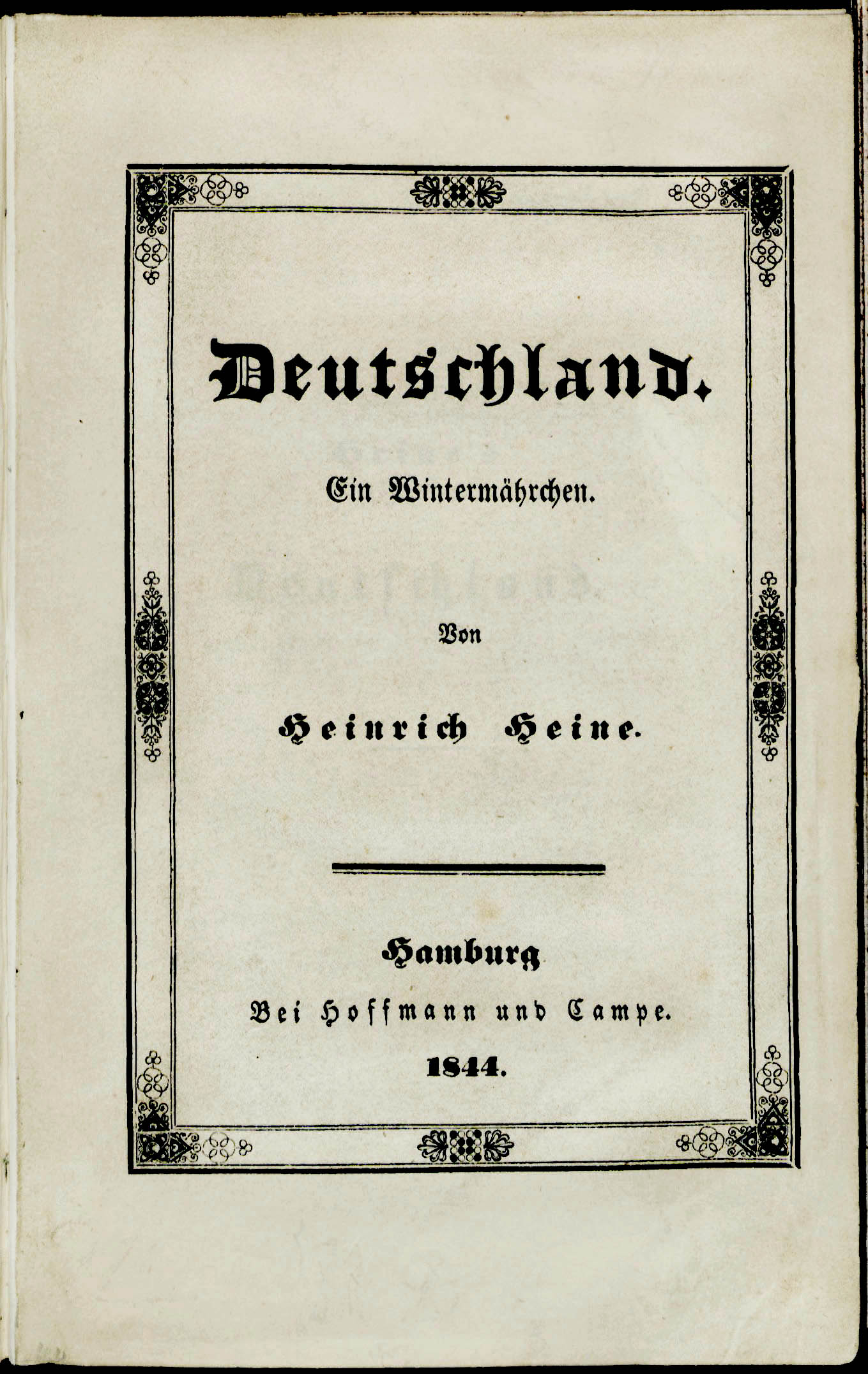 Heine, Heinrich: Deutschland - Ein Wintermährchen. Titelblatt (Interimsbroschur) der ersten Separatausgabe 1844.